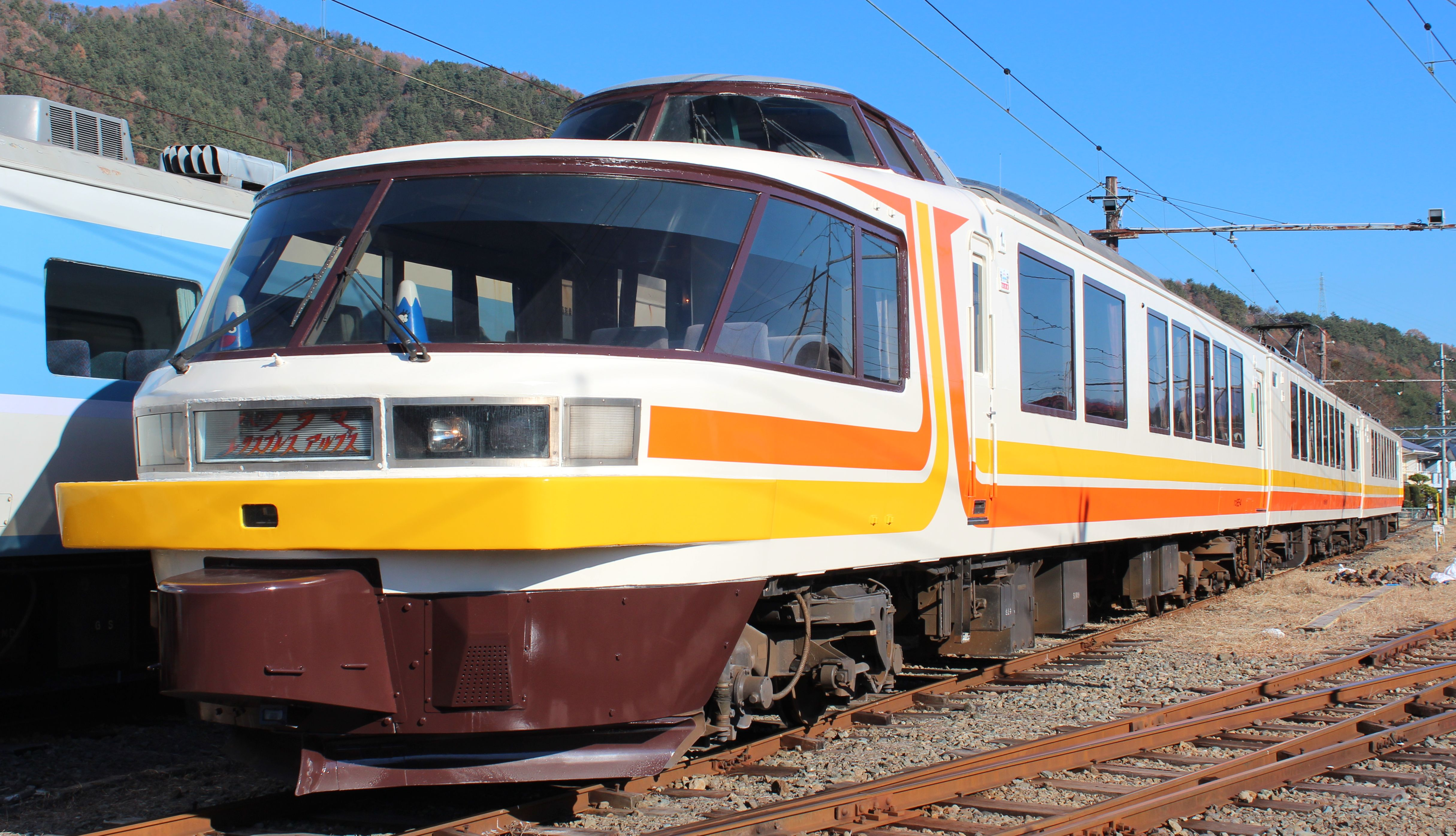 富士急行2000形電車 「パノラマエクスプレスアルプス」 河口湖駅で撮影